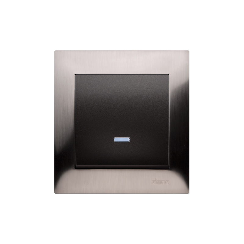 Łącznik jednobiegunowy serii Simon 54 Premium, 2012 rok. Nazwa producenta: KONTAKT - SIMON Spółka Akcyjna.